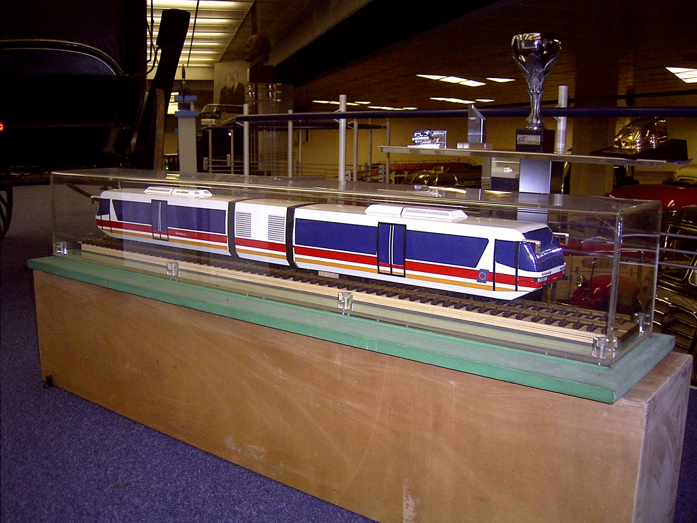 Neoplan-De Dietrich Eurailbus (Modell) im Neoplan-Museum Stuttgart-Möhringen fotografiert von Tilius 5.1.2006